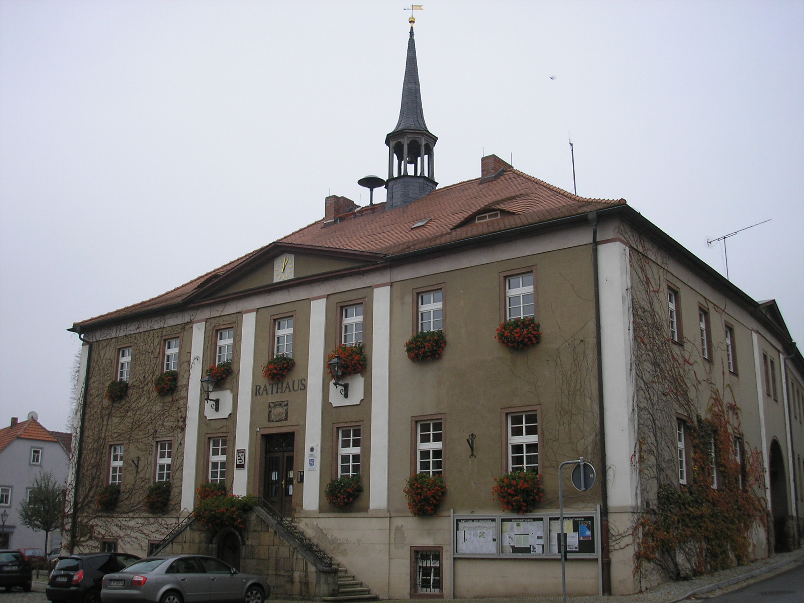 Das Rathaus von Wiehe (Thüringen).